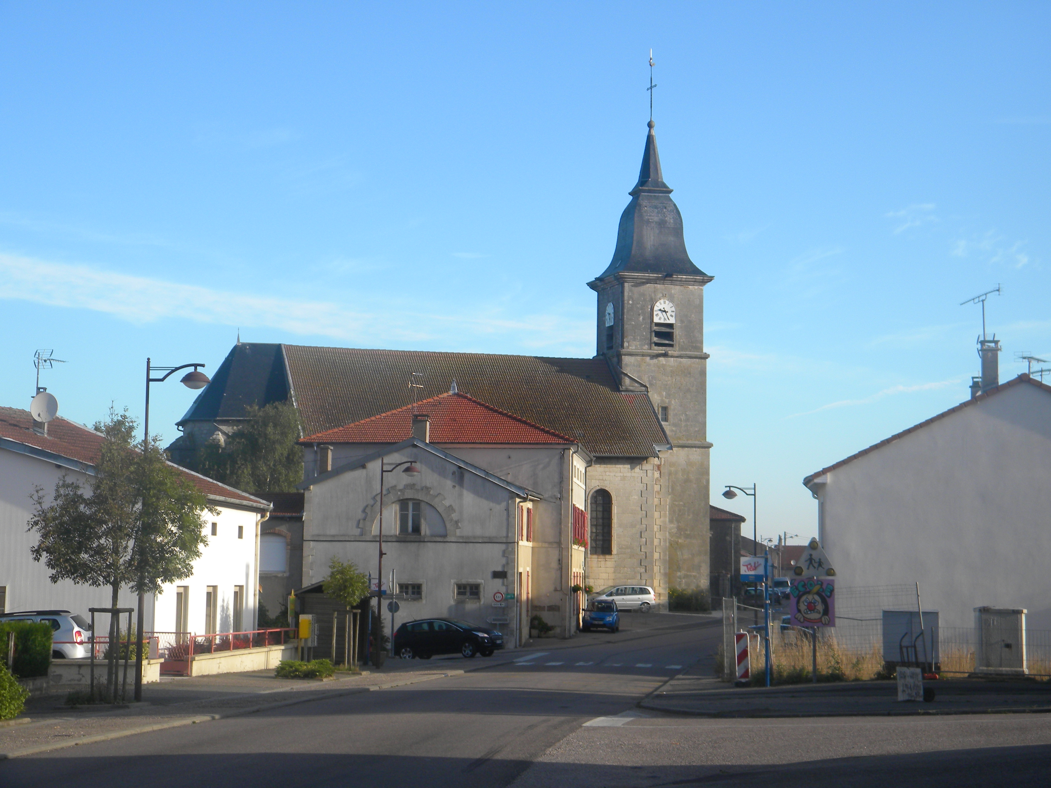 Allain église Saint-Maurice